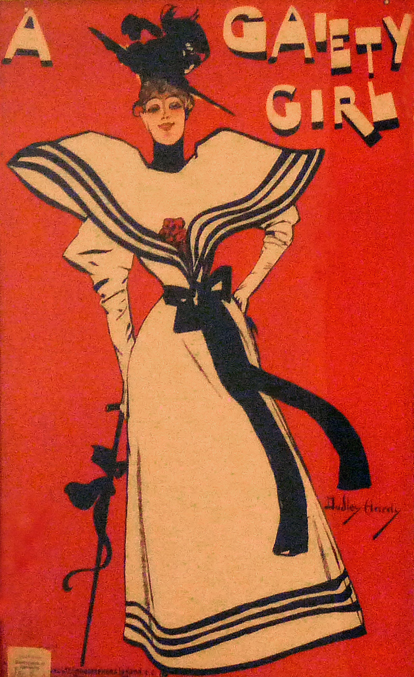 Dudley Hardy, affiche A Gaiety Girl, lithographie, Musée d'art moderne et contemporain de Strasbourg.